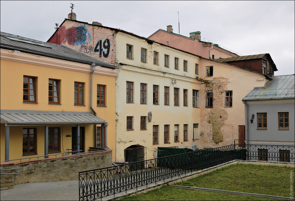 Гіст. забудова Мінска